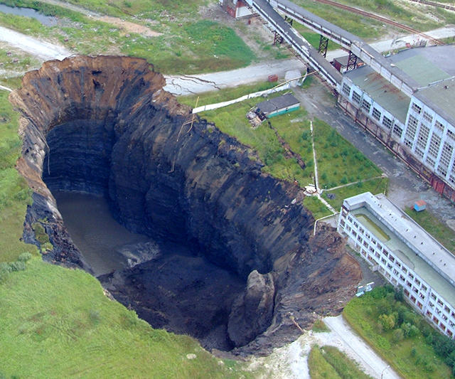 Провал в г.Березники на БРУ-1